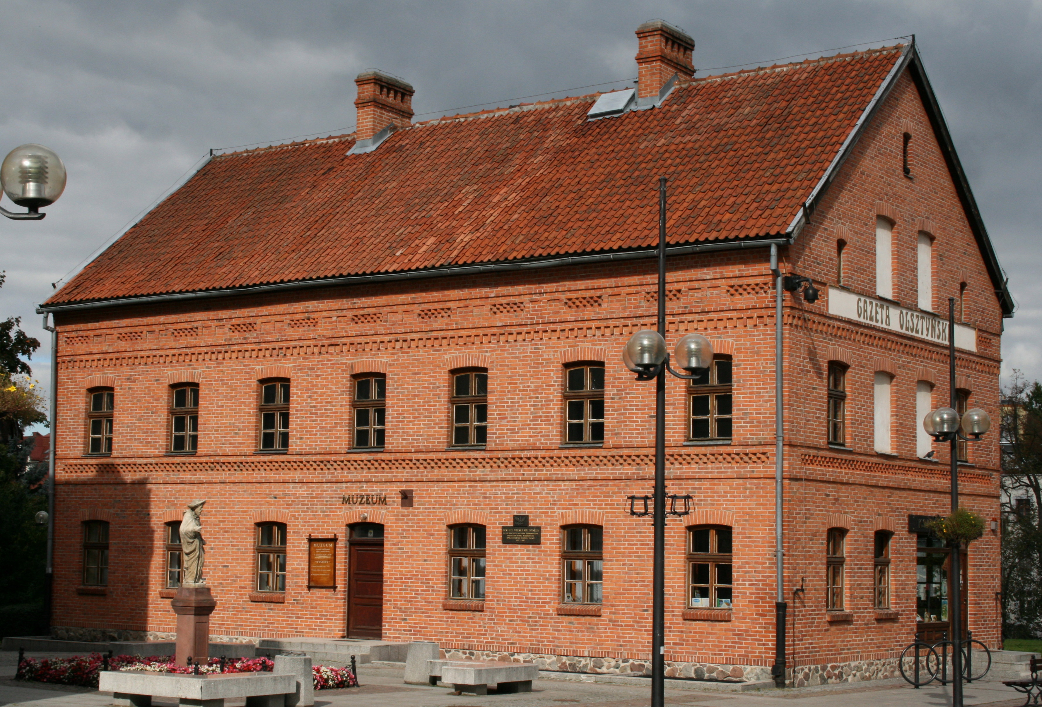 Dom Gazety Olsztyńskiej Targ Rybny 2, Olsztyn